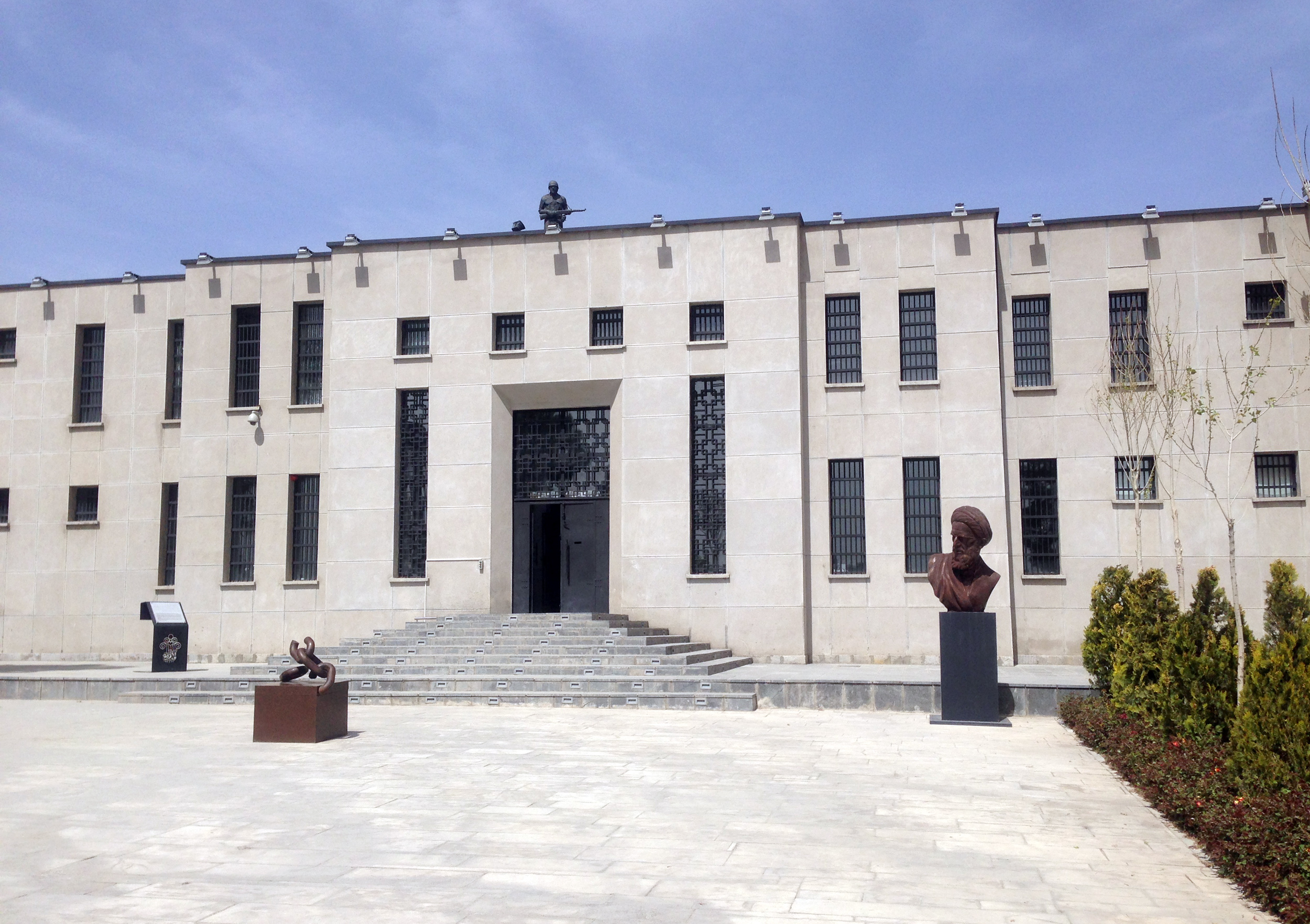 زندان قصر